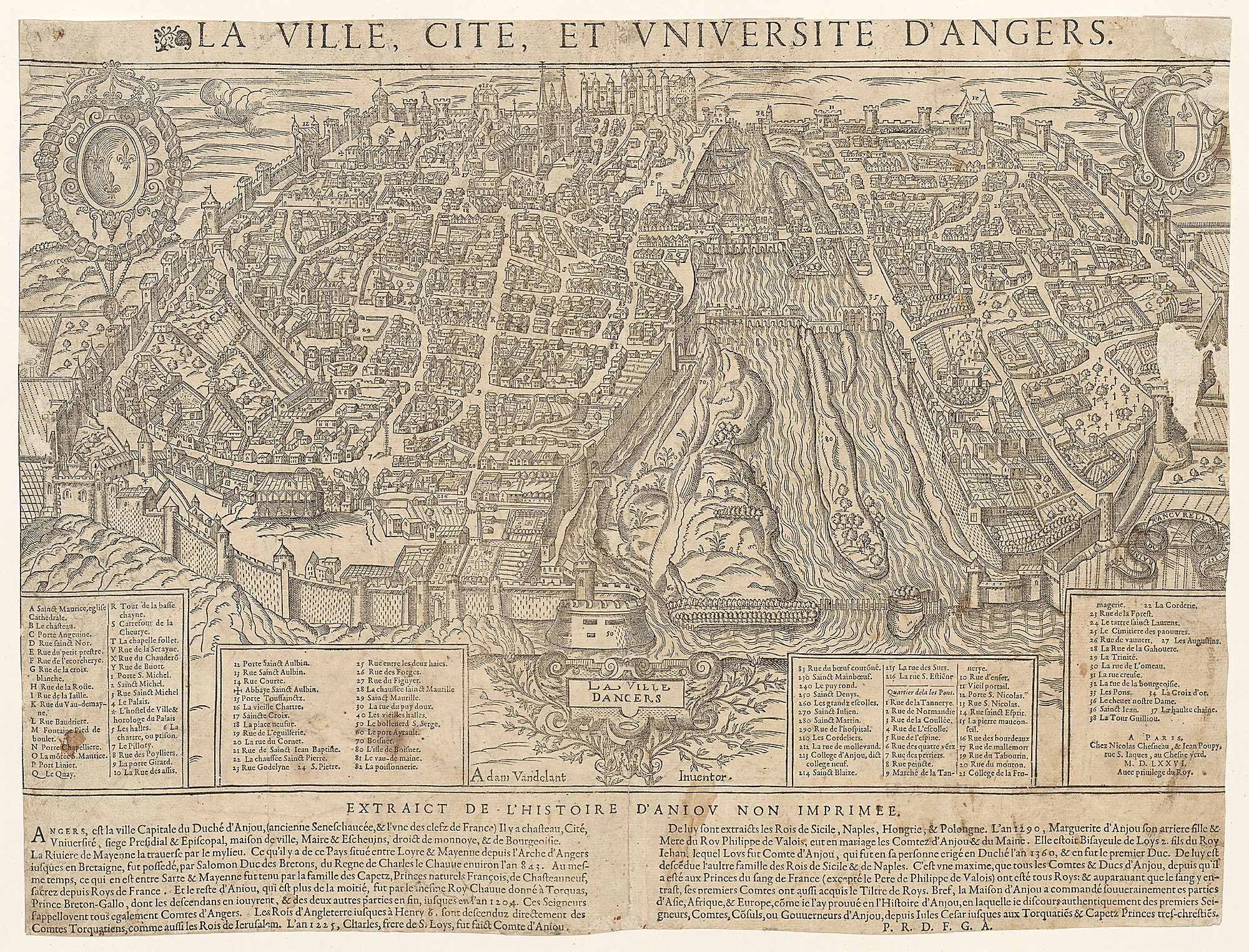 Rancurelli, Raimondo: La ville, cité et université d'Angers; Kupferstich, 1575